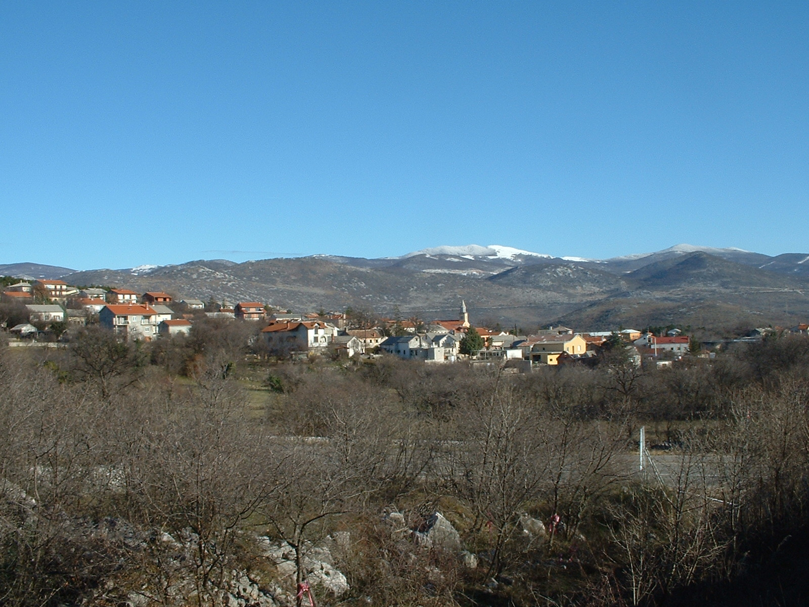 Skrljevo